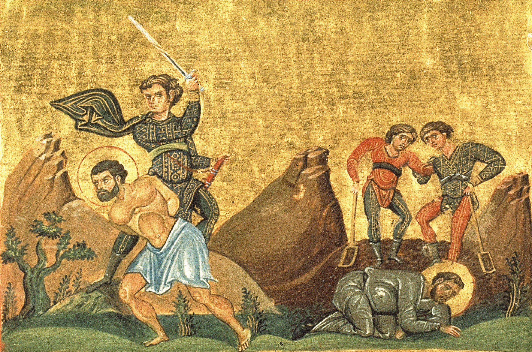 Священномученик Феопемпт и мученик Феона волхв (в крещении Синесий) Никомидийский Константинополь. 985 г. Миниатюра Минология Василия II. Ватиканская библиотека. Рим.